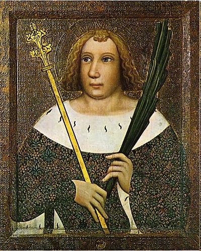 Saint Witt